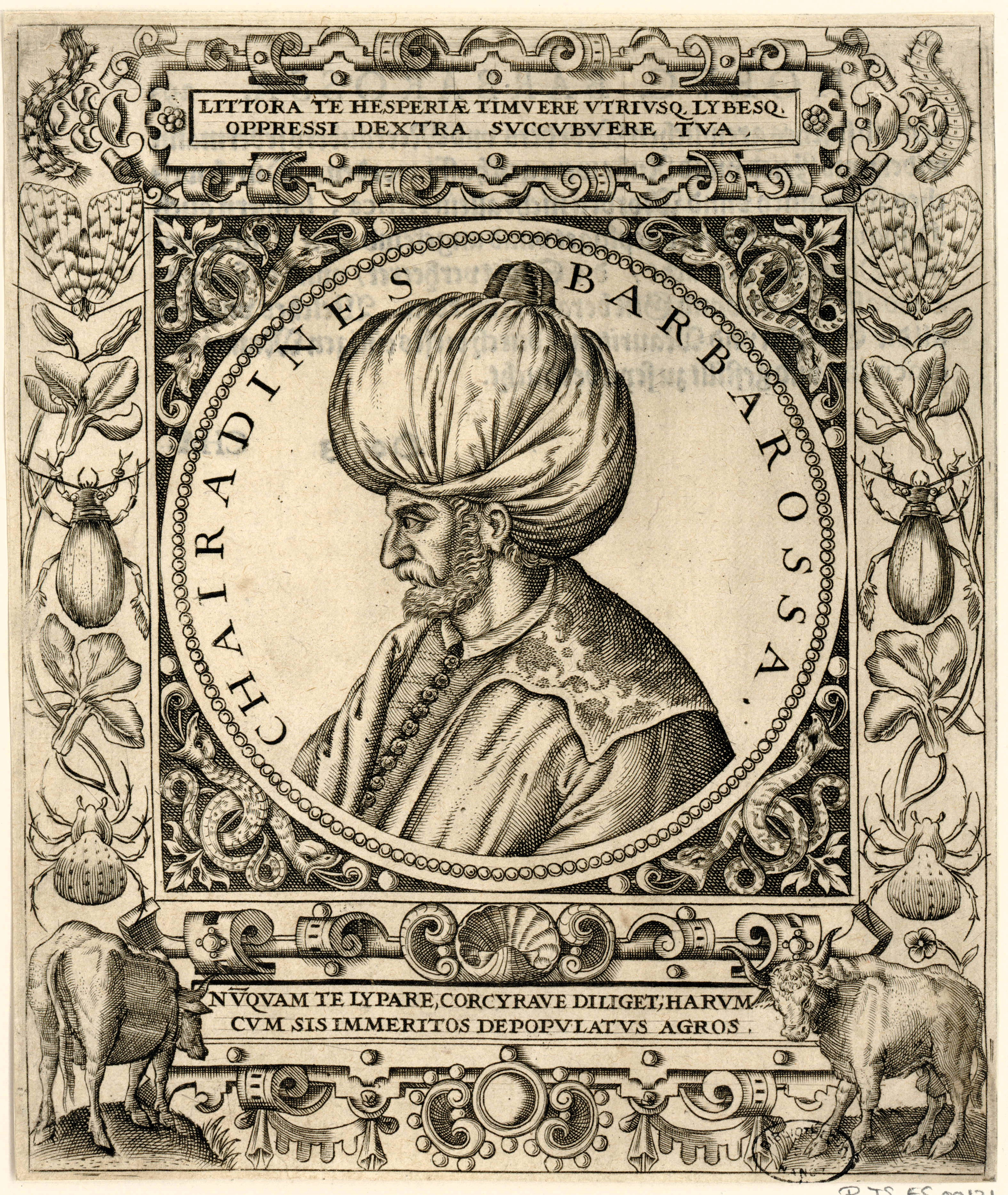 Grafik aus dem Klebeband Nr. 1 der Fürstlich Waldeckschen Hofbibliothek Arolsen Illustration aus: Georg Greblinger: Wahre Abbildungen der Türckischen Kayser vnd Persischen Fürsten / so wol auch anderer Helden und Heldinnen von dem Osman / biß auf den andern Mahomet. Johann Ammon, Frankfurt 1648 Motiv: "Chairadines Barbarossa" (= Barbaros Hayreddin Pascha)